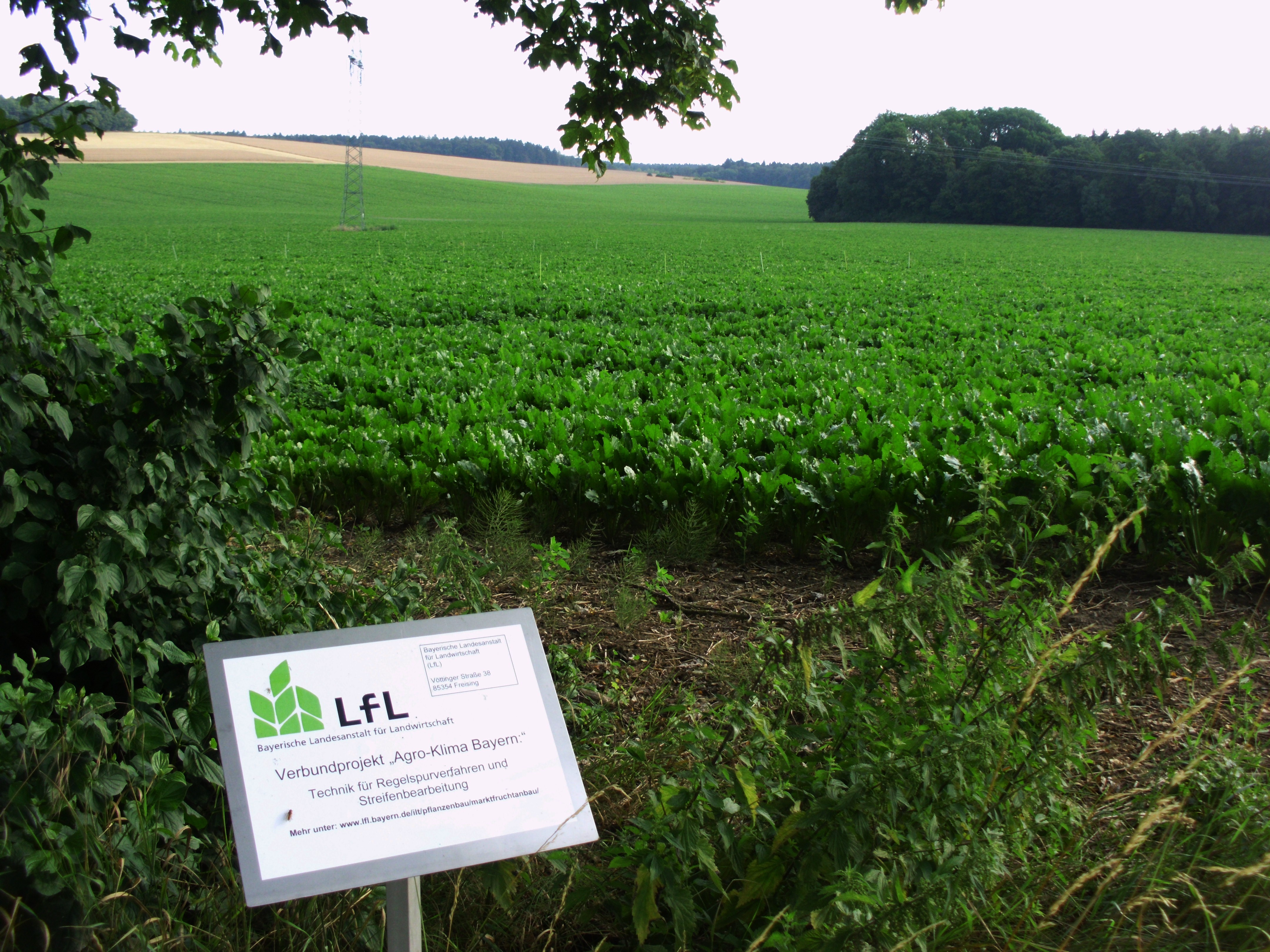 Hofgut Dittenfeld, Ortsteil von Rennertshofen im Landkreis Neuburg-Schrobenhausen, Zuckerrüben-Versuchsfeld